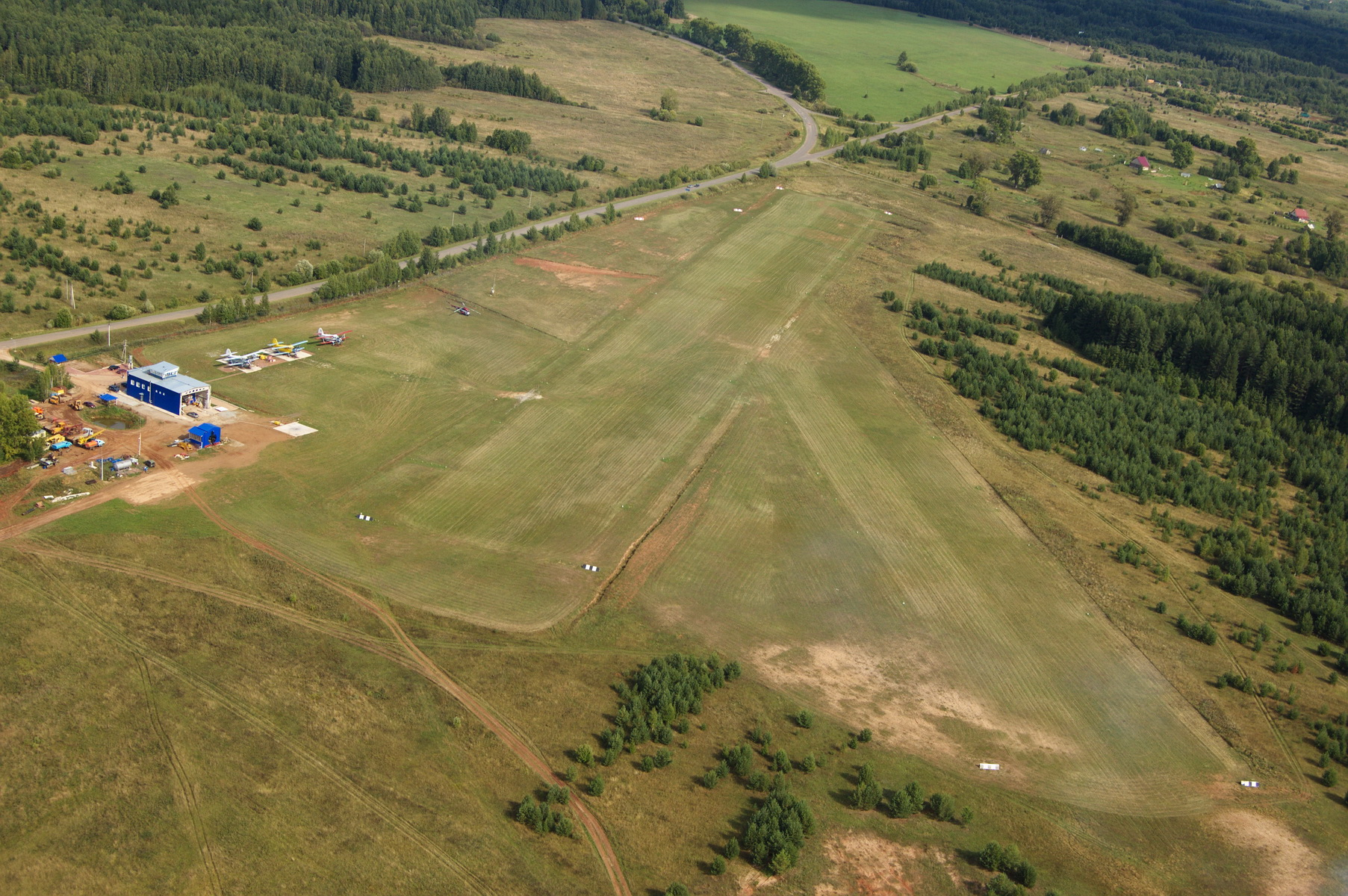 ПП "Кучаны" с воздуха